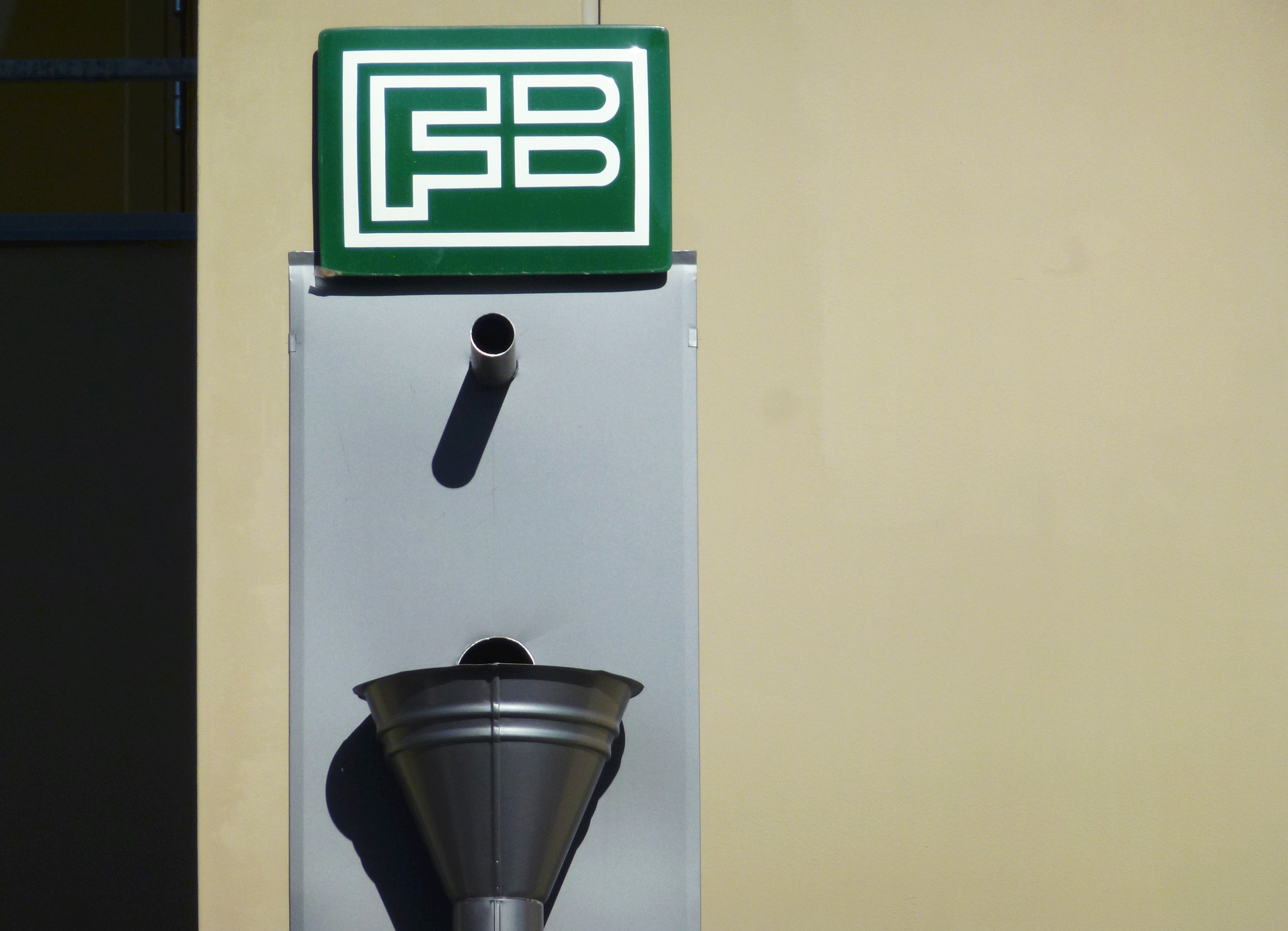 Stadsradhus vid Kransbindarvägen Midsommarkransen